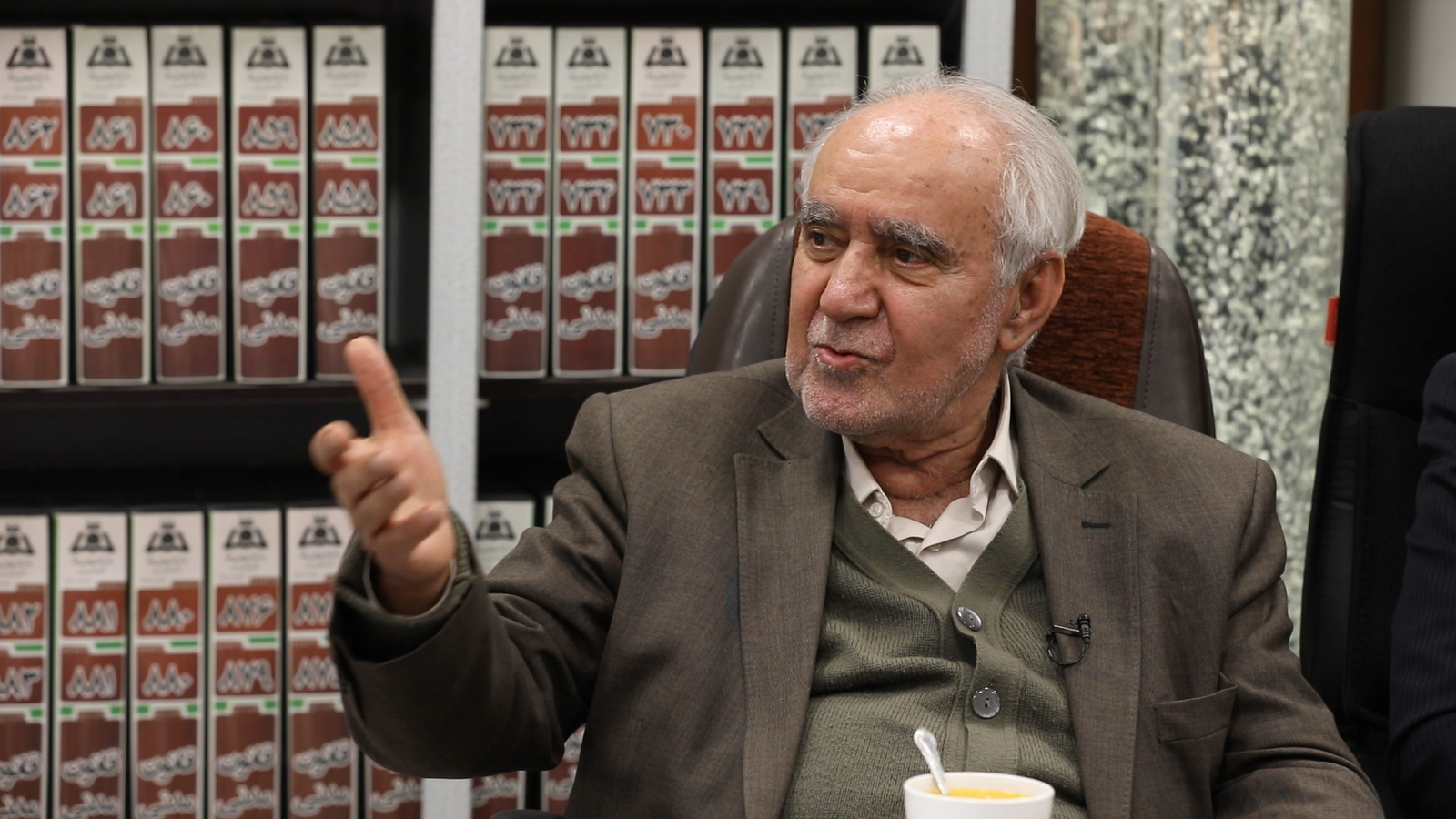 دکتر صفایی در مرکز پژوهشی دانشنامه های حقوقی علامه